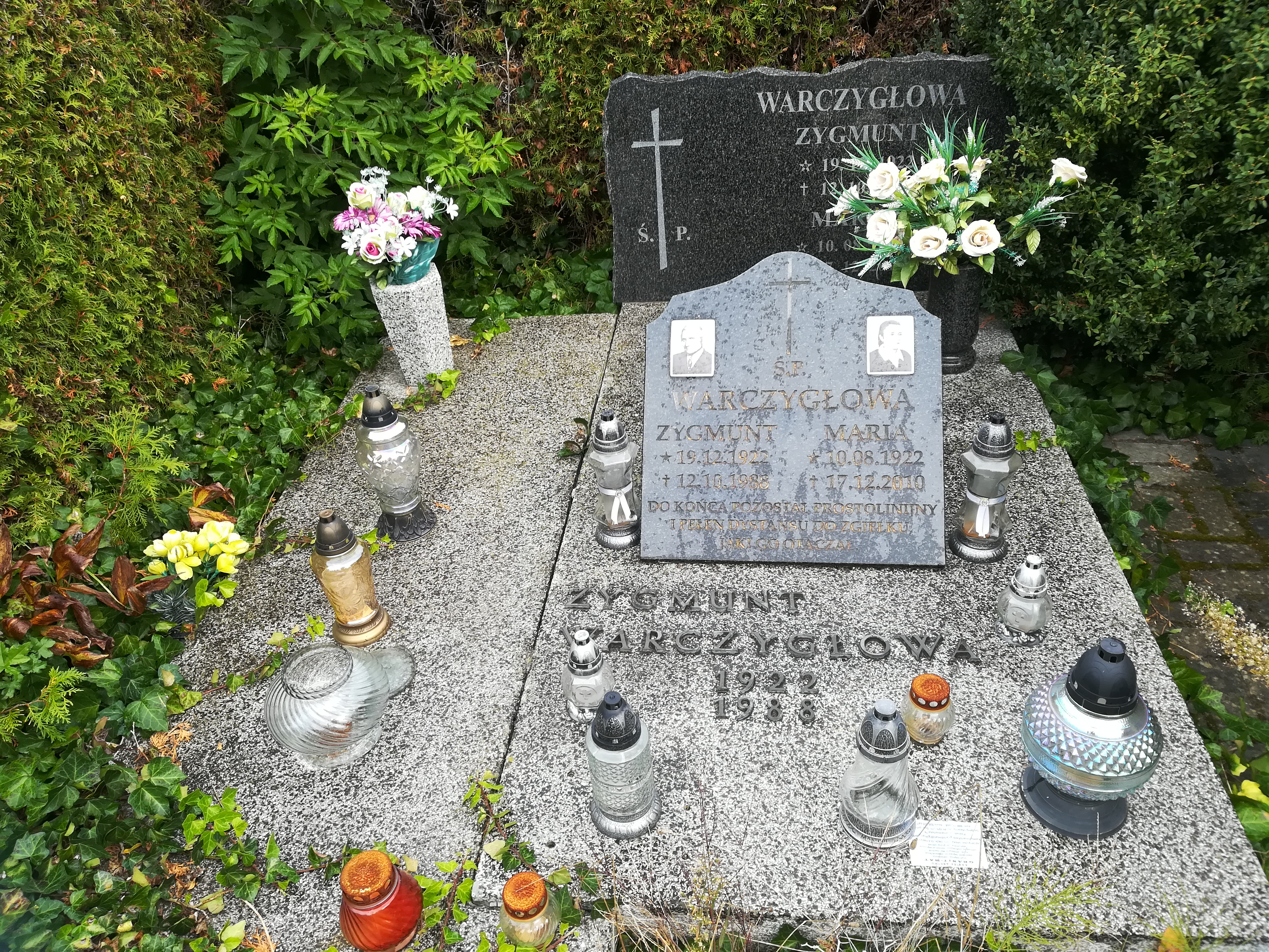 Cmentarz Junikowski - Poznań. Grób Zygmunta Warczygłowy.